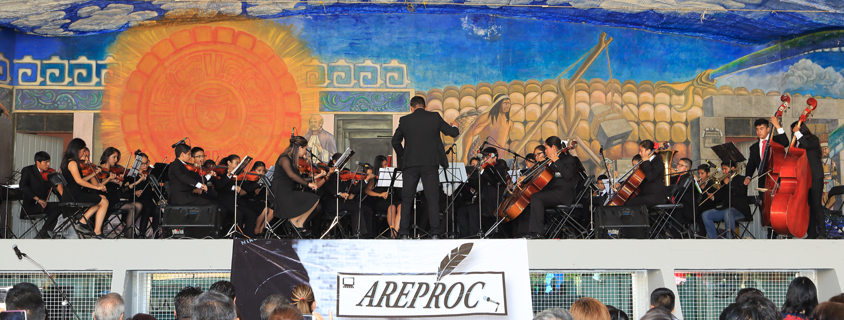 Orquesta Sinfónica Infantil y Juvenil de Tlaxcoapan